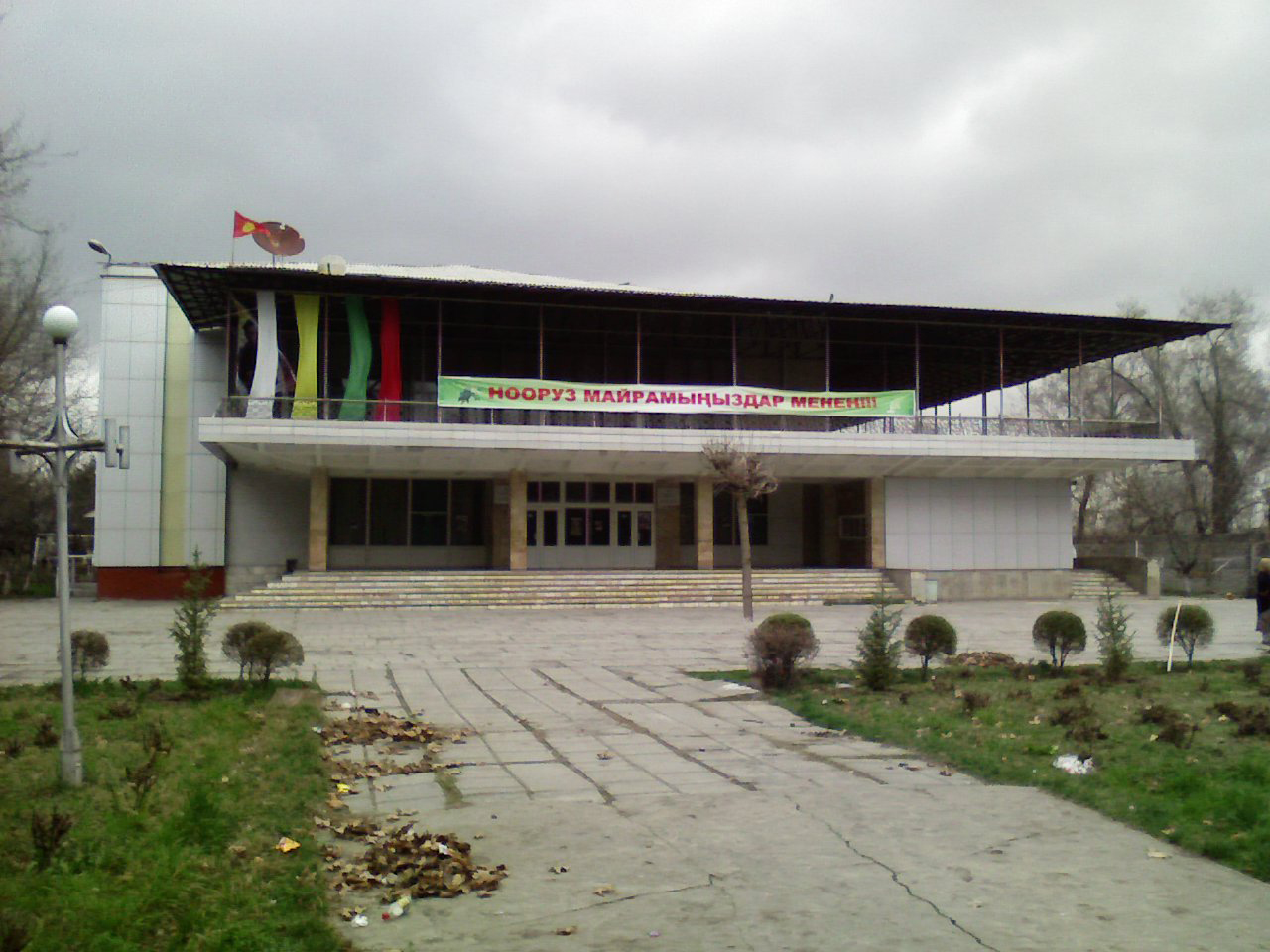 Здание Ошского узбекского театра им. Бабура (бывш. им. Кирова)